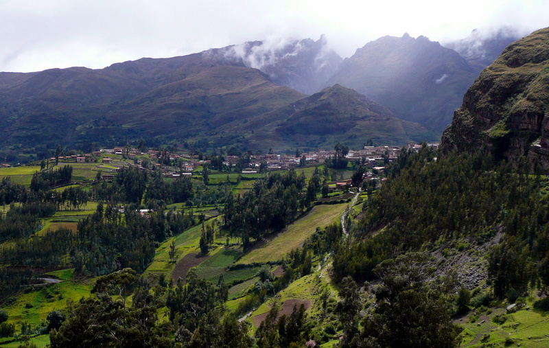 Vista de Chacas desde la entrada al este